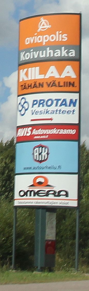 Aviapolis-brändin kadunvarsikyltti Koivuhaan kaupunginosassa, varsinaisen Aviapoliksen suuralueen (kaupunginosajaotus) ulkopuolella. Huom: Muista säilyttää viittaus kuvaajaan, mikäli käytät kuvaa.